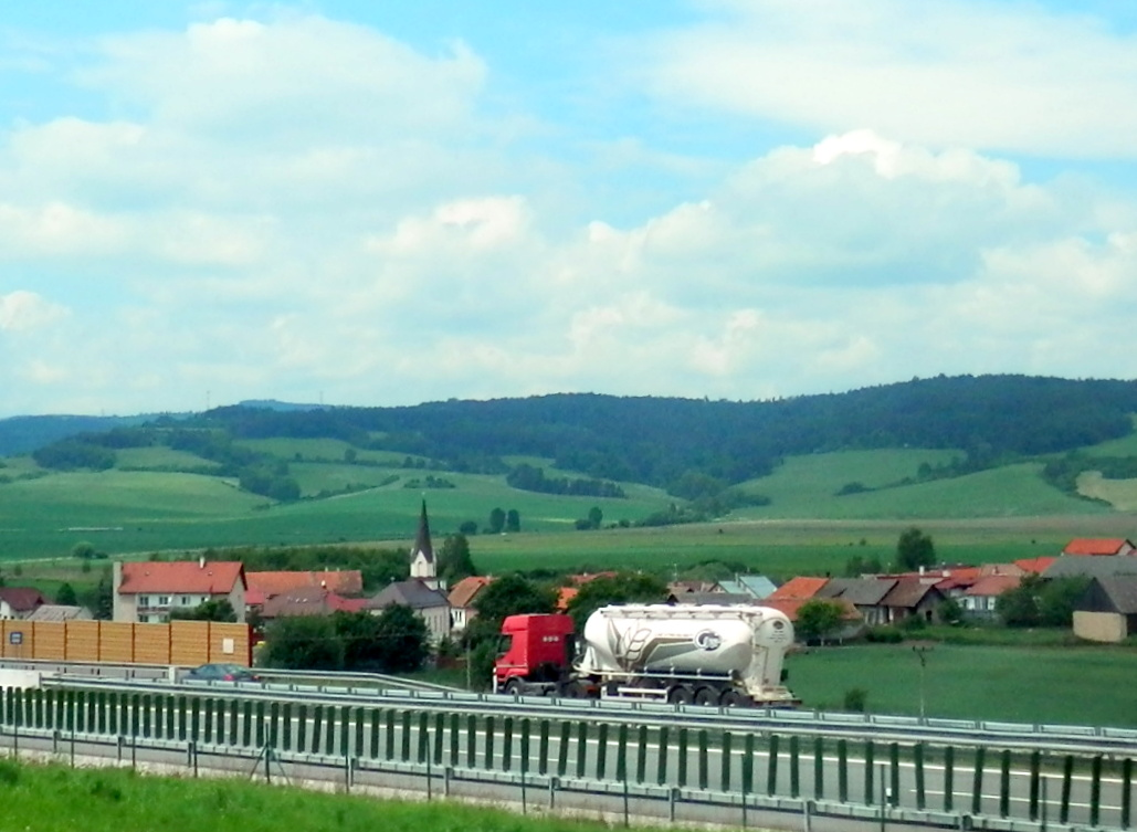 Diaľnica D1 v úseku tunel Branisko-Nemešany. Okres Levoča. V pozadí obec Studenec